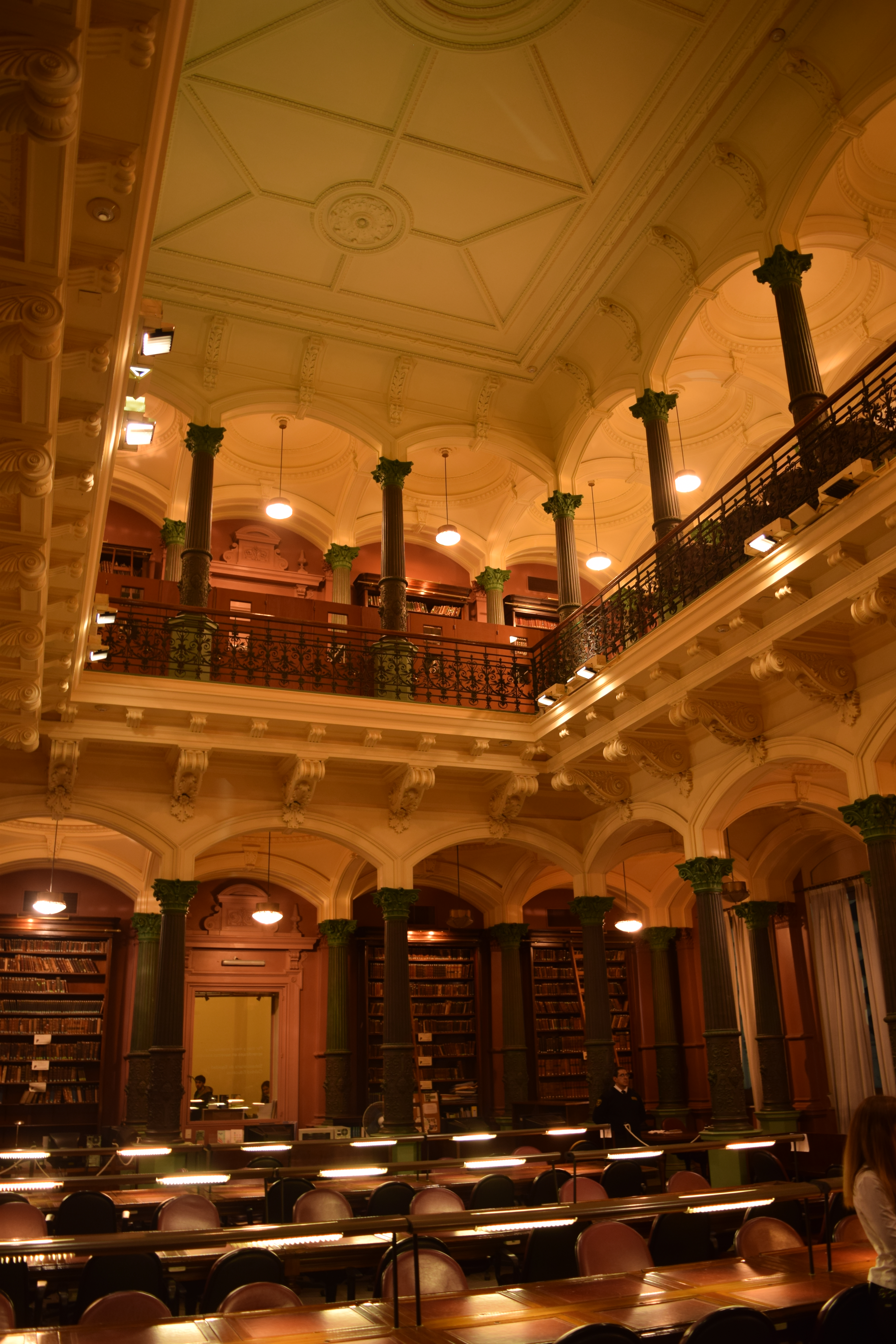 Biblioteca Nacional de Maestros dentro del Palacio Pizzurno durante la Noche de los Museos 2015.